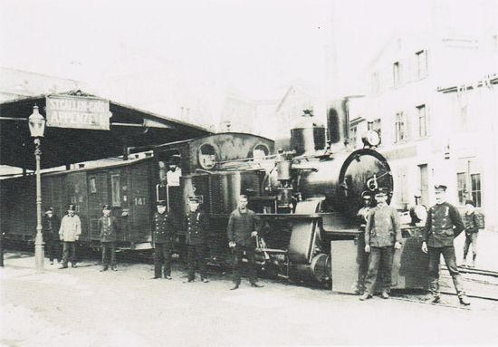 Die ursprüngliche Abfahrtsstelle auf dem Bahnhofplatz in St. Gallen. Das Personal posiert stolz vor der Lok Nr. 5 „Appenzell“.